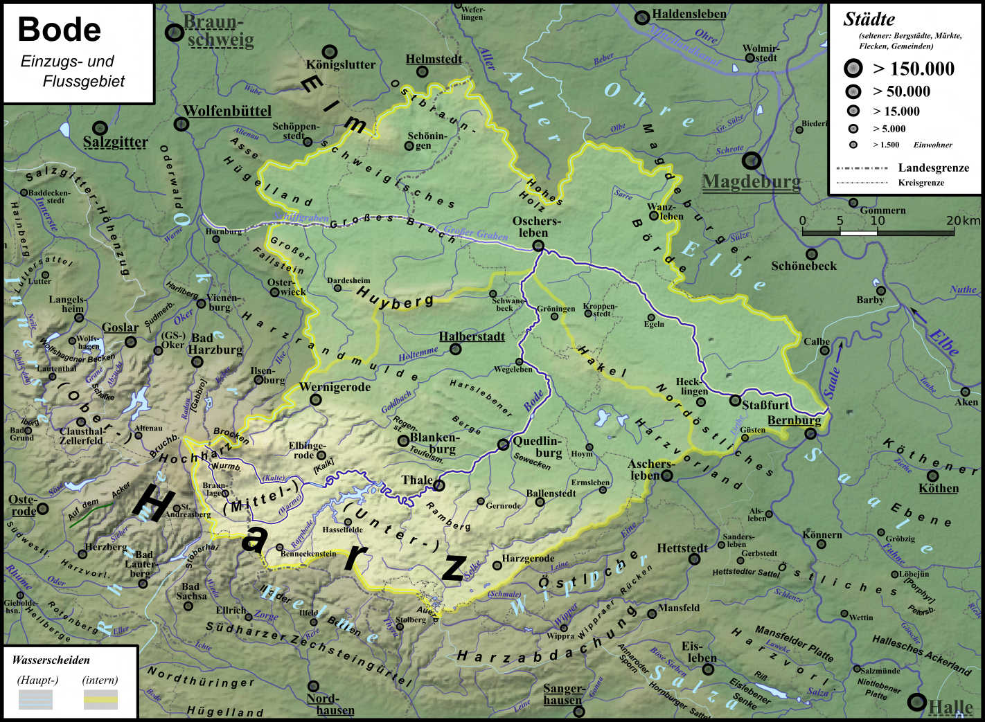 Einzugs- und Flussgebietskarte des Saale-Nebenflusses Bode und ihrer wichtigsten Nebenflüsse. Hervorgehoben ist auch die Mündungs-Bifurkation Großer Graben, die nach Westen zur Oker entwässert.